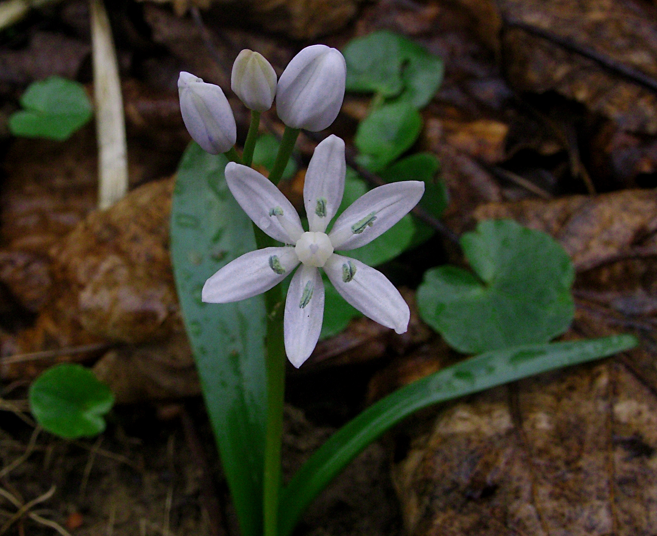 Cebulica dwulistna, stanowisko na Pogórzu Ciężkowickim, miejscowość: Bączal Dolny